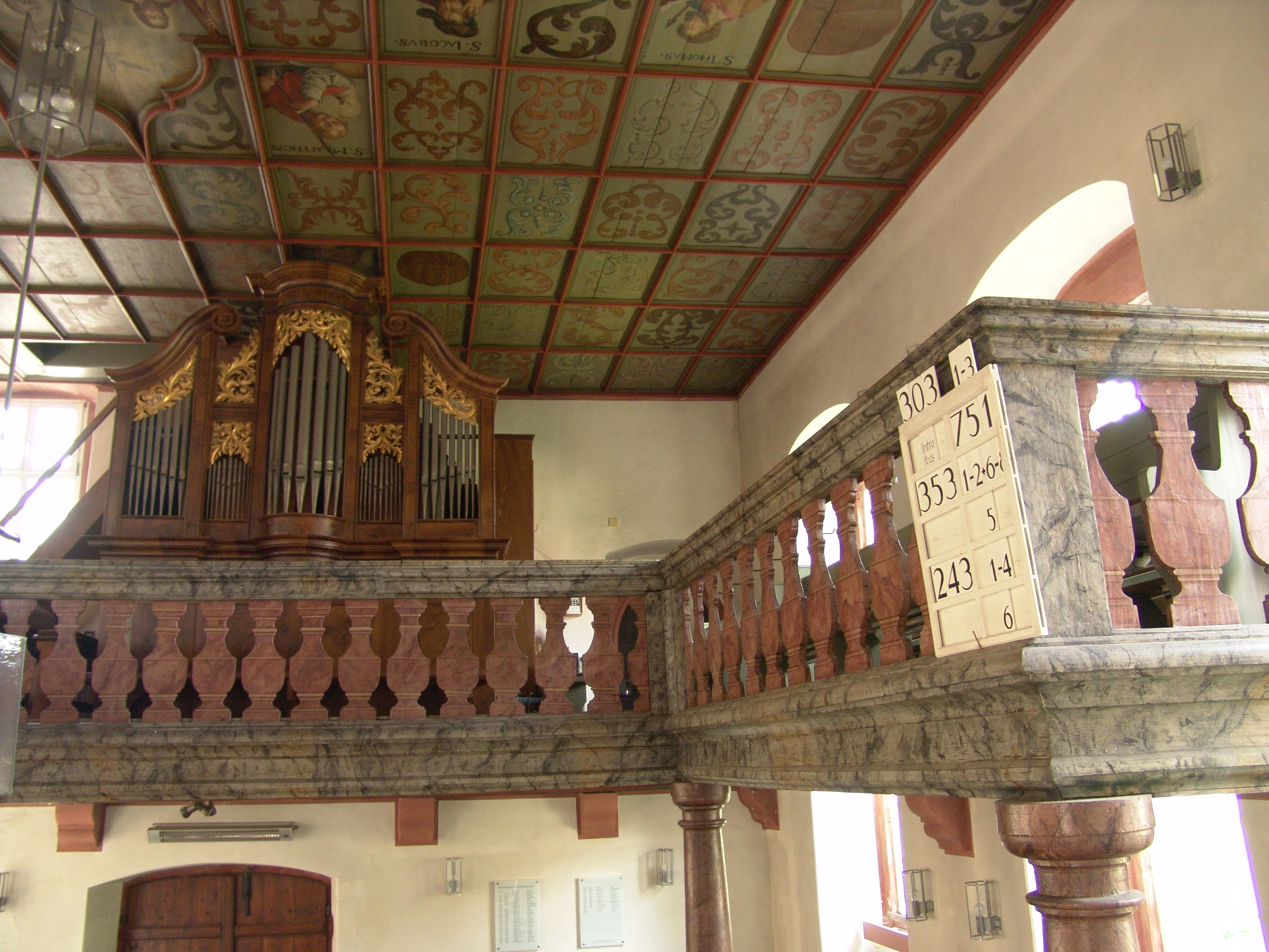 Zeilitzheim evang.-luth. Kirche St. Sigismund